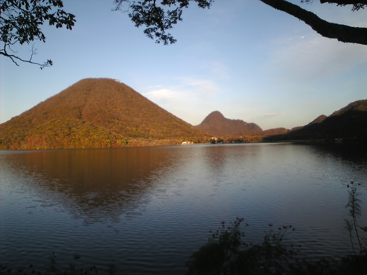 榛名山